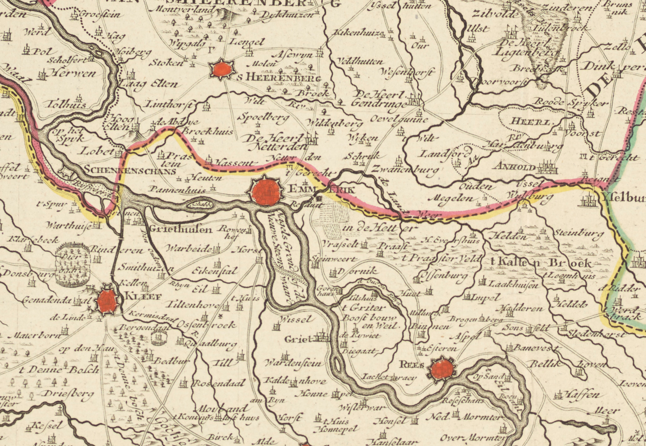 Nieuwe Kaart Van Het Hertogdom Kleef, detail: De Hetter, tussen 1725 en 1750